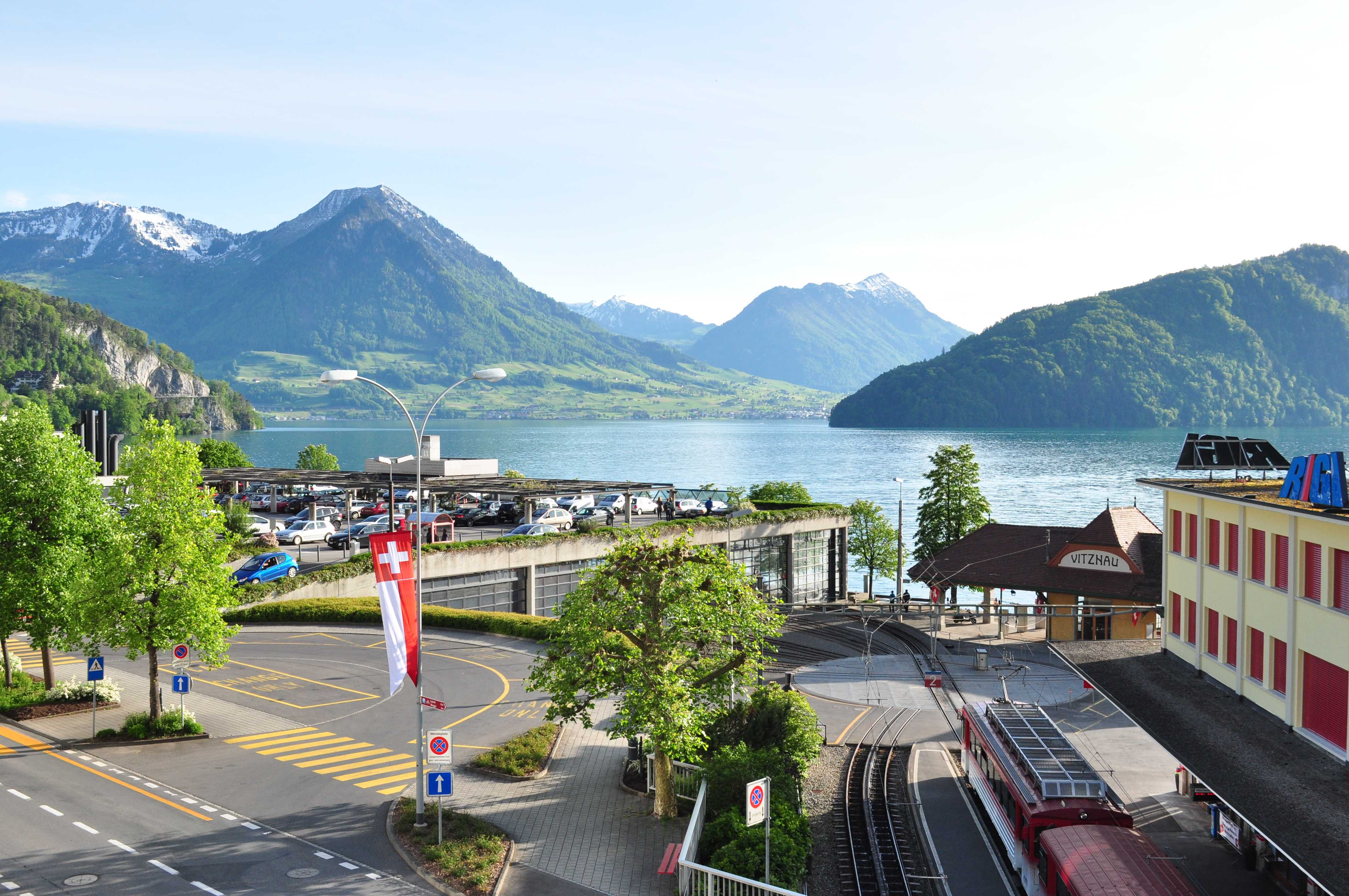 La gare de Vitznau sur la VRB des Rigi Bahnen. Au second plan, le Lac des Quatre Cantons.